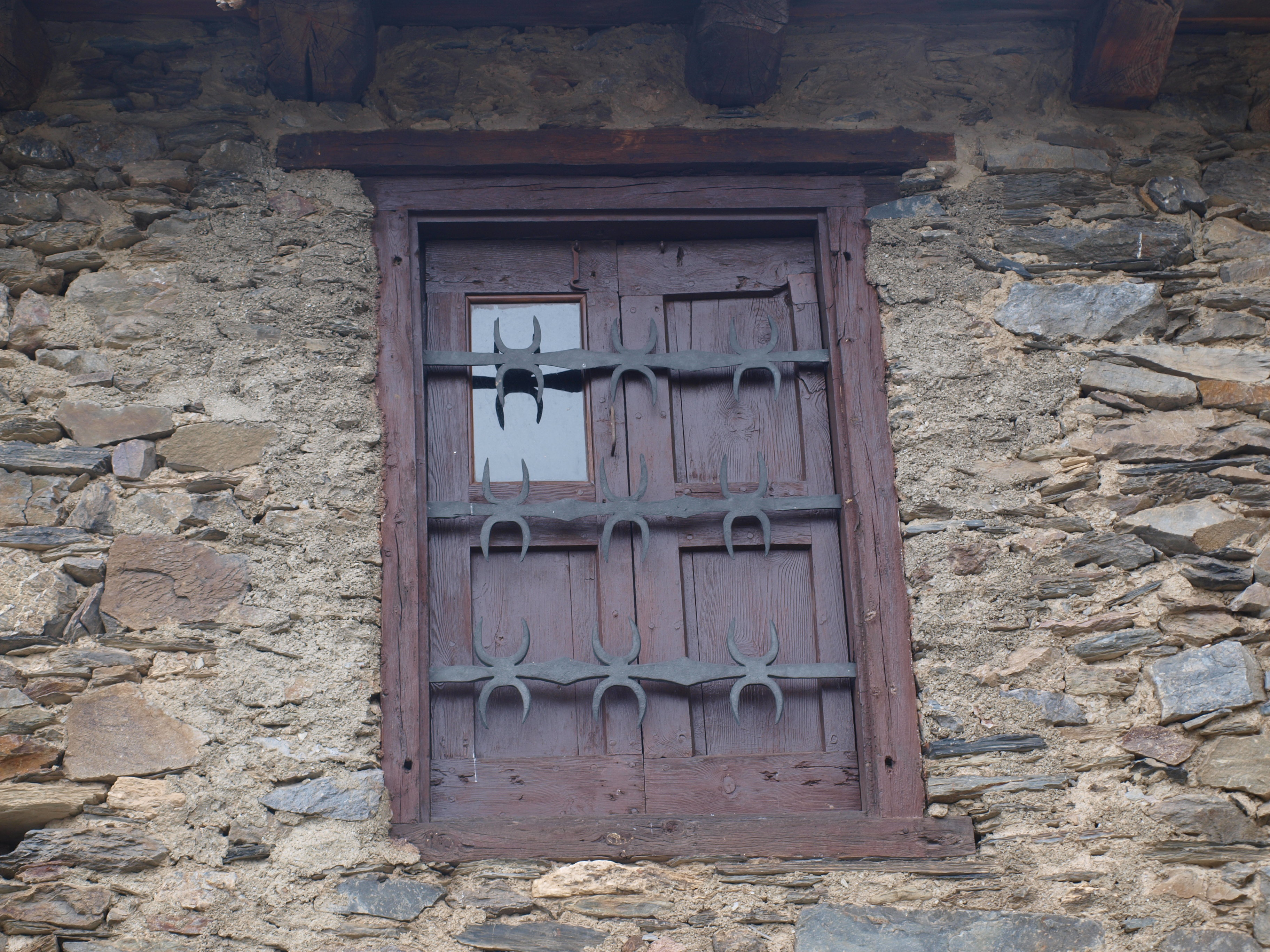 Estripagecs d'una finestra del Museu Casa Rull